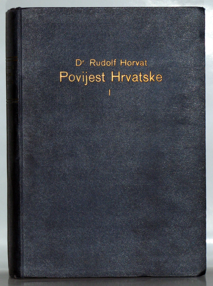 Rudolf Horvat, Povijest Hrvatske I, Zagreb, 1924. godine